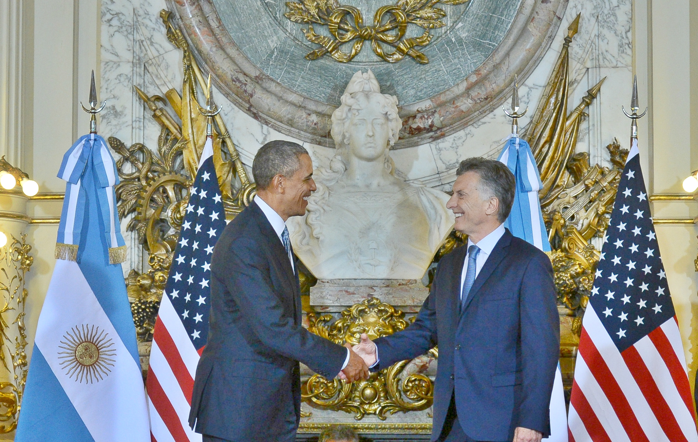 El presidente Mauricio Macri recibió esta mañana en Casa Rosada al primer mandatario de los Estados Unidos, Barack Obama, quien arribó al país como parte de su gira por América Latina y en una visita de dos días que incluirá la firma de acuerdos de cooperación en materia de seguridad, comercio y educación.